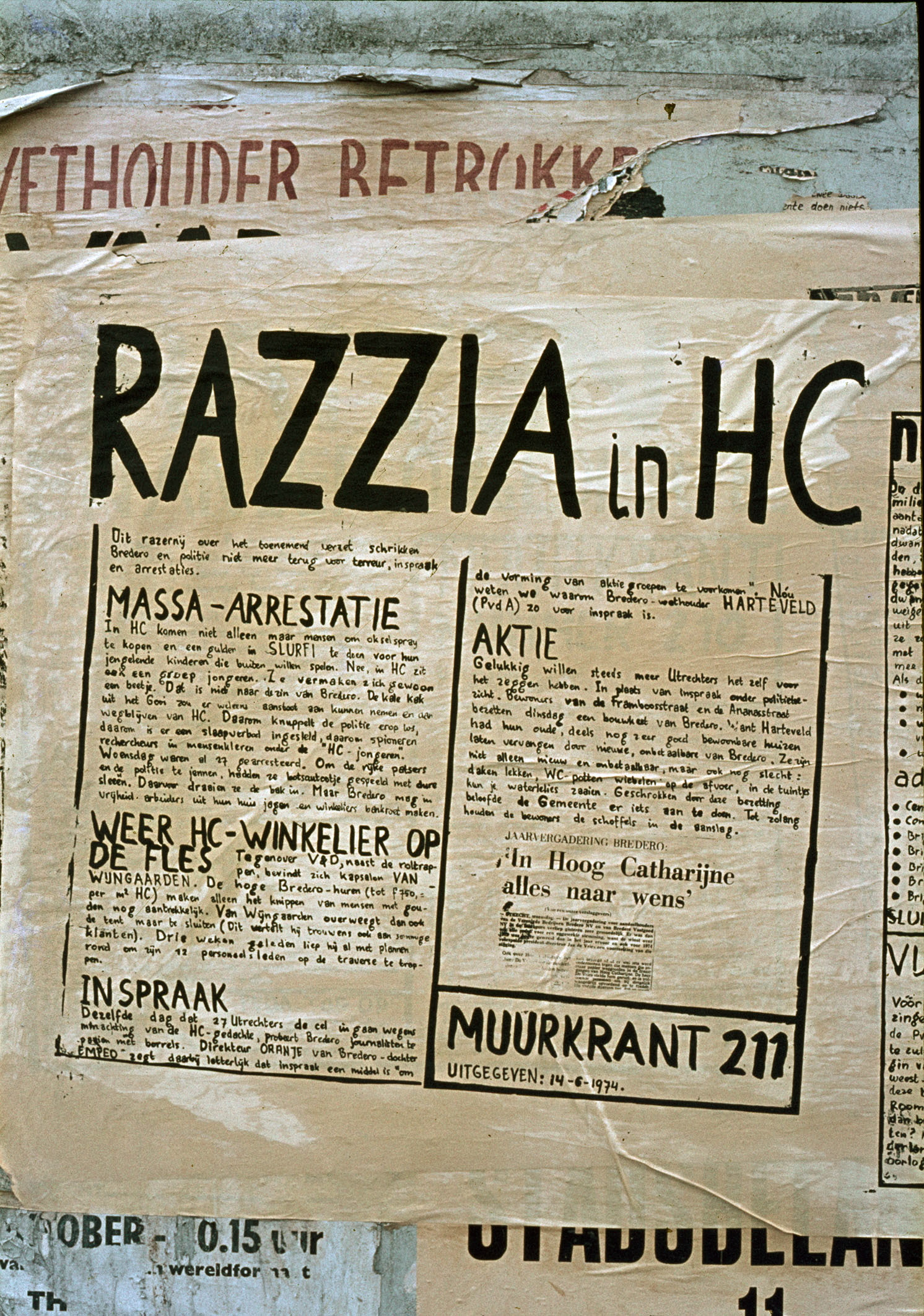 Muurkrant nr. 211 te stad Utrecht, juni 1974, met daarin een klachtschrift over Hoog Catharijne